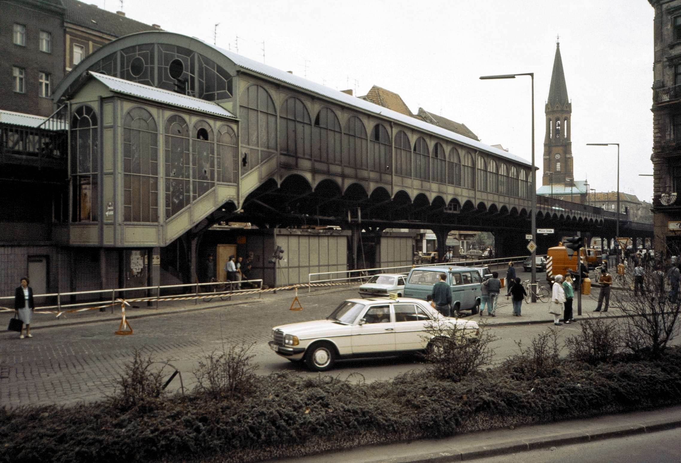 U-Bahnhof Görlitzer Bahnhof Berlin